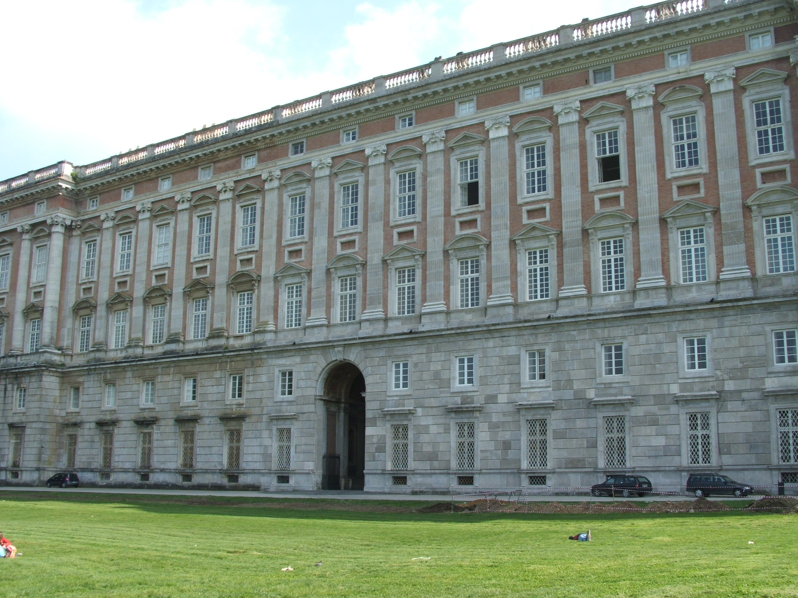 Immagine dalla Reggia di Caserta, Caserta, Campania, Italia. Il Parco